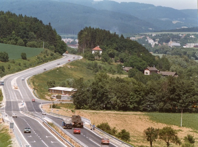 fotka slušovické dálnice vybudované v roce 1986-87, poskytl majitel společnosti JZD Agrokombinát Slušovice František Čuba.